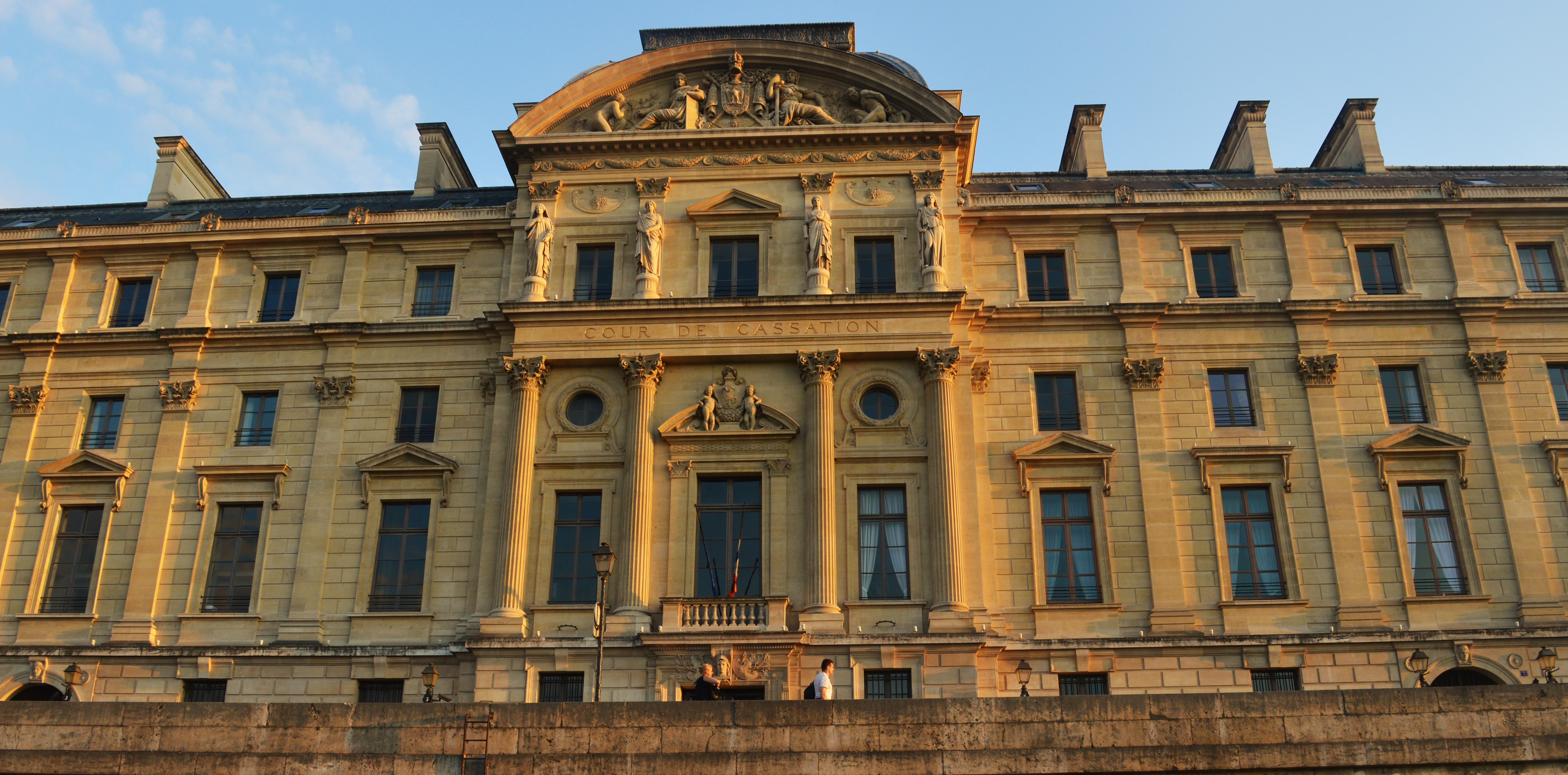 Court of Cassation, Quai de l'Horloge, Paris.